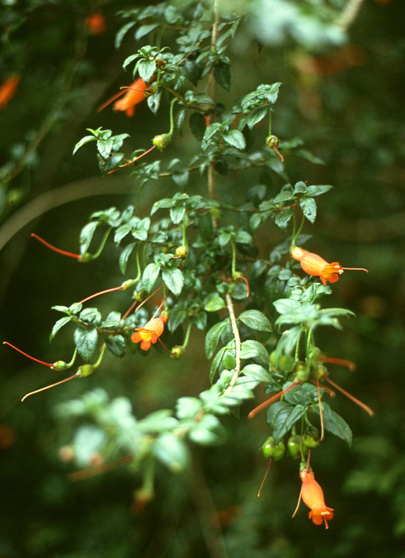 Mitraria coccinea, Gesneriaceae - Chile, Termas Aguas Calientes, Parque Nacional Puyehue (Prov. de Osorno)